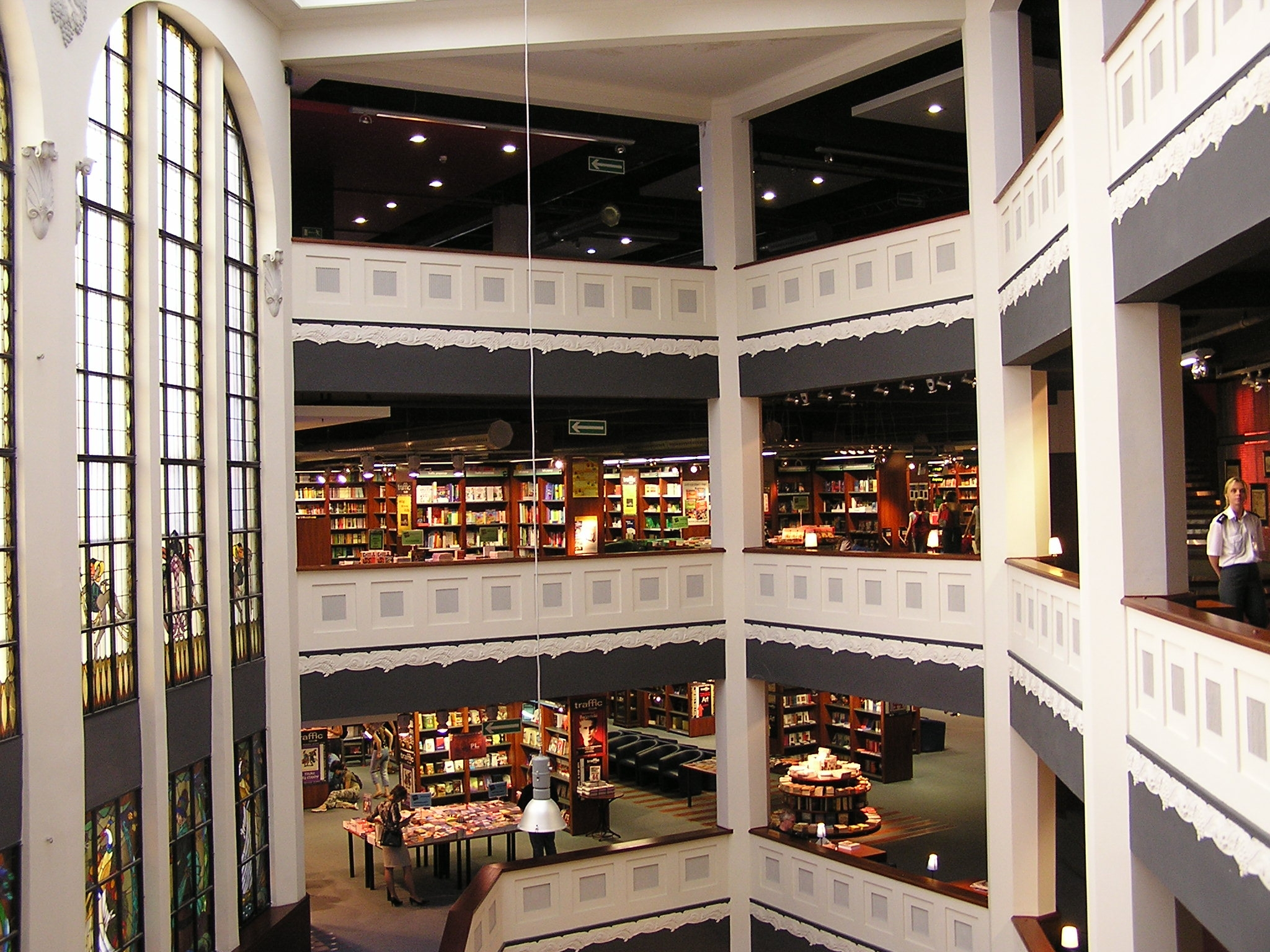 Wnętrze Domu Towarowego Braci Jabłkowskich.